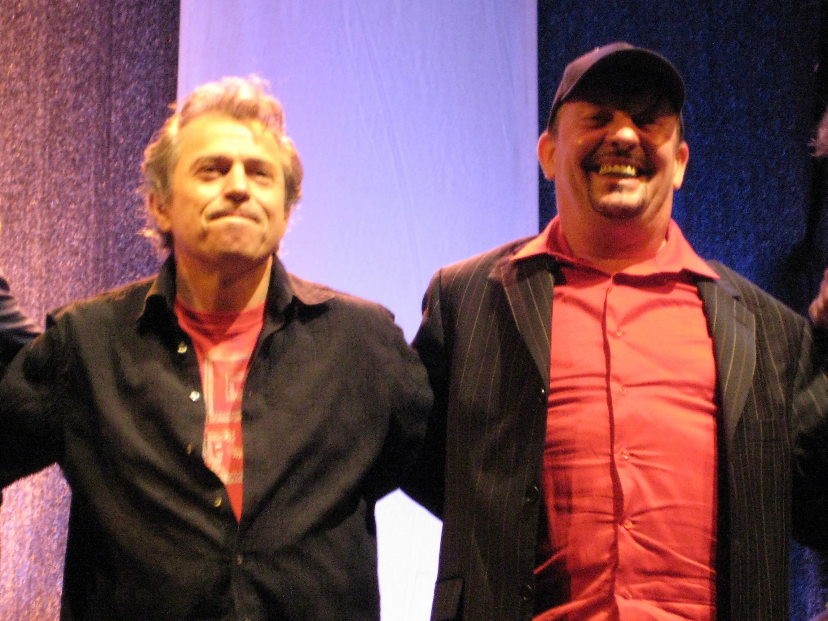 Spider Murphy Gang, Passau (Residenzplatz), Günther Sigl und Gerhard Gmell („Barny Murphy“)